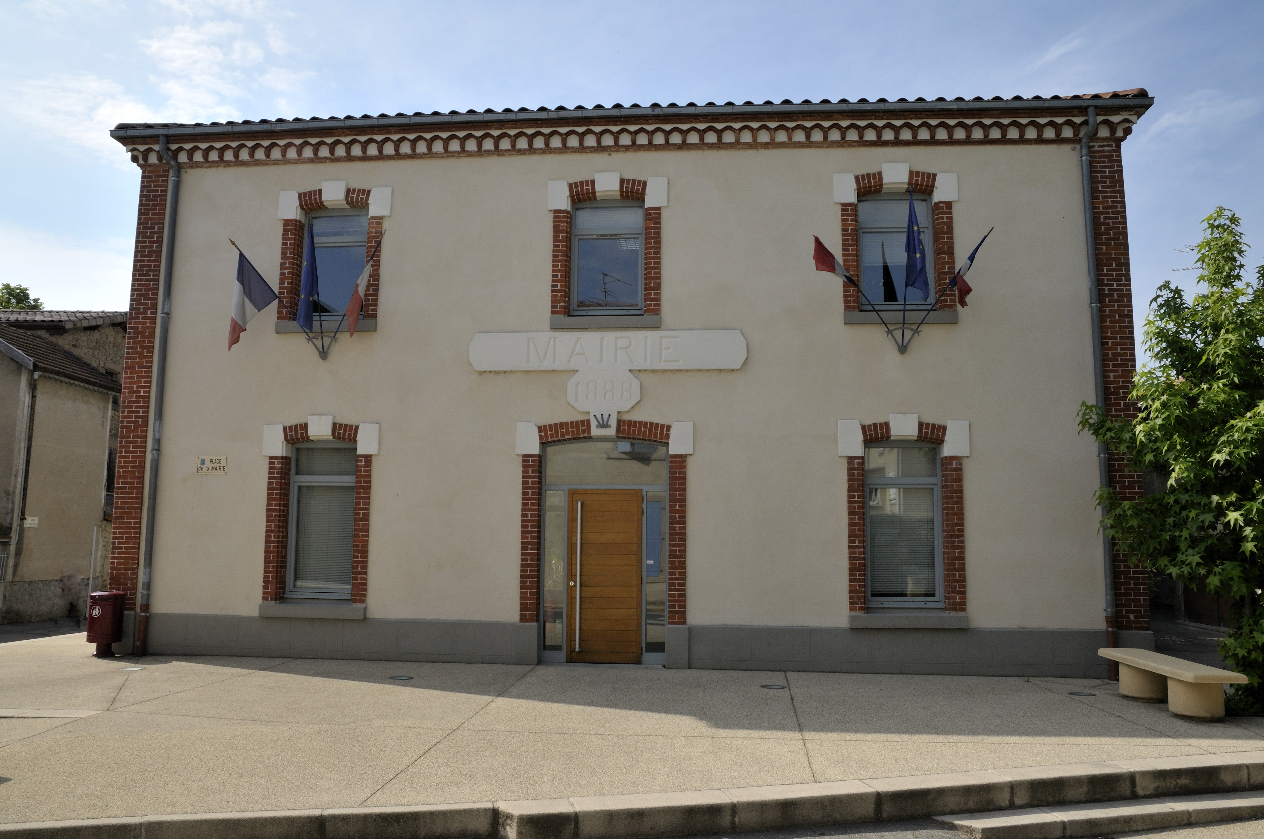 la mairie